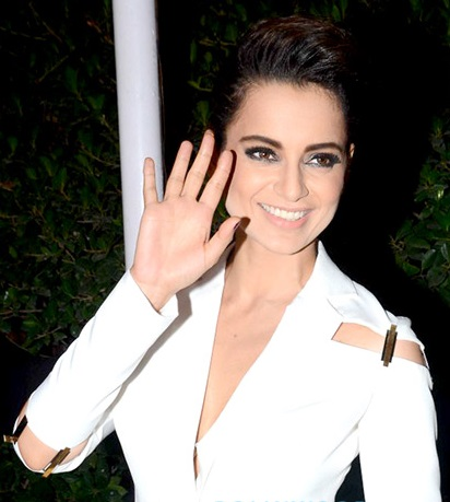 Kangana Ranaut snapped on (4 June 2016) at 'Yamaha Fascino Miss Diva 2016'